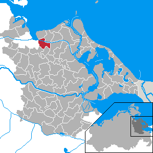 Kemnitz, Landkreis Ostvorpommern, Mecklenburg-Vorpommern